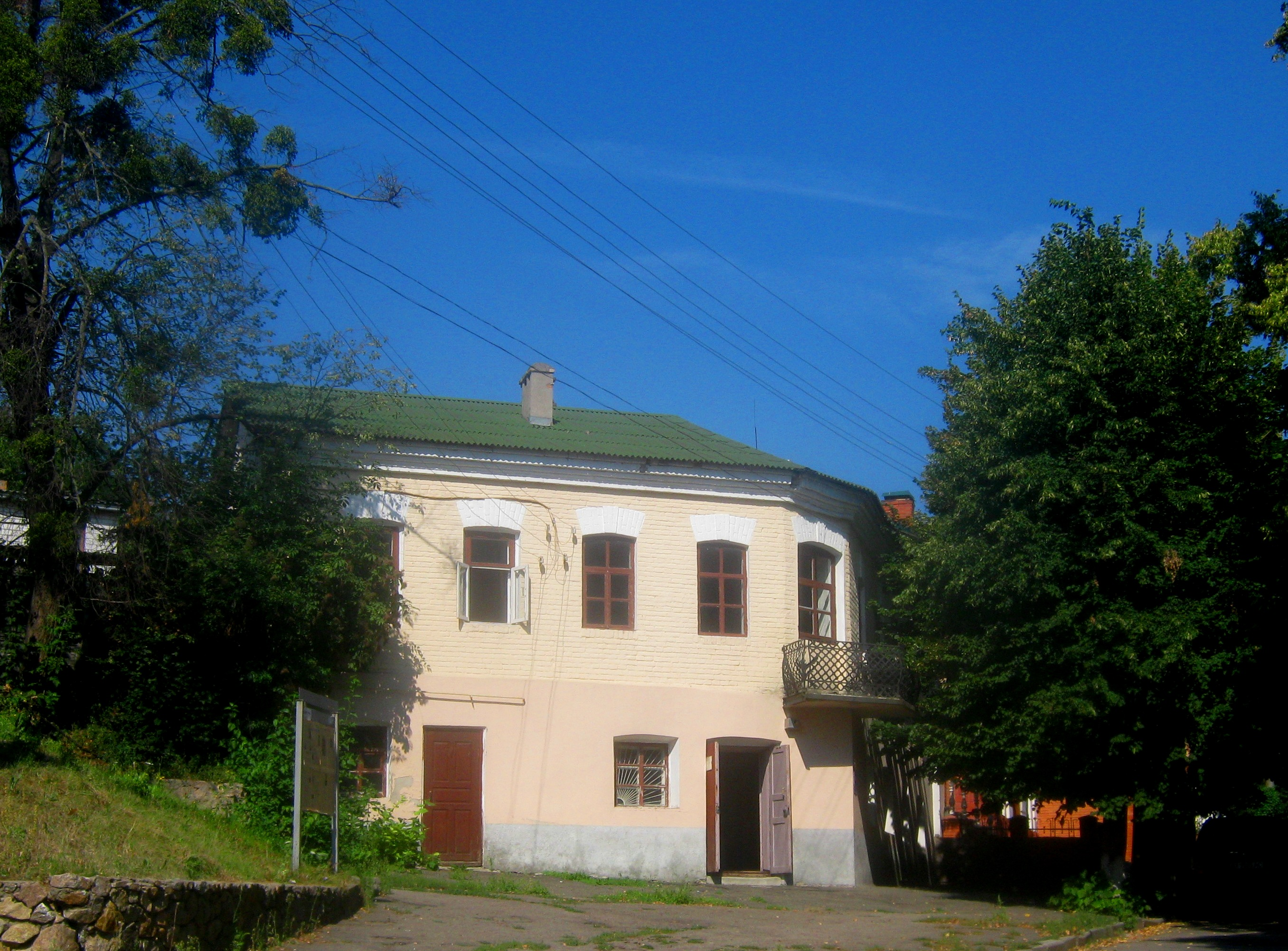 Музей "Канів від давнини до сучасності", розташований у будівлі, де розміщувалась крамниця єврейських торгових рядів (1898 р.)